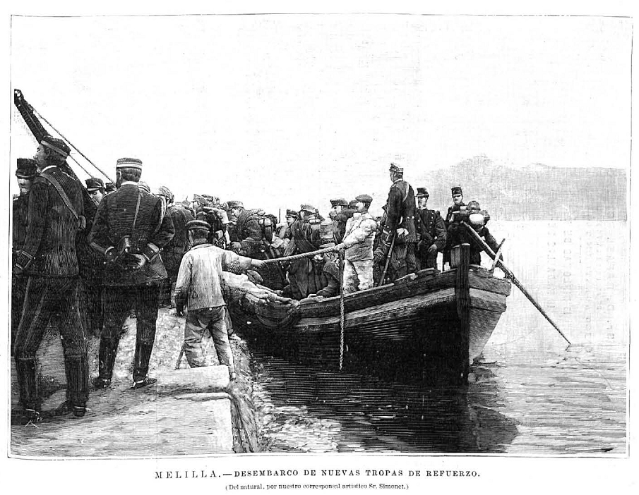 Desembarco de nuevas tropas de refuerzo, Melilla, en la revista española La Ilustración Española y Americana.